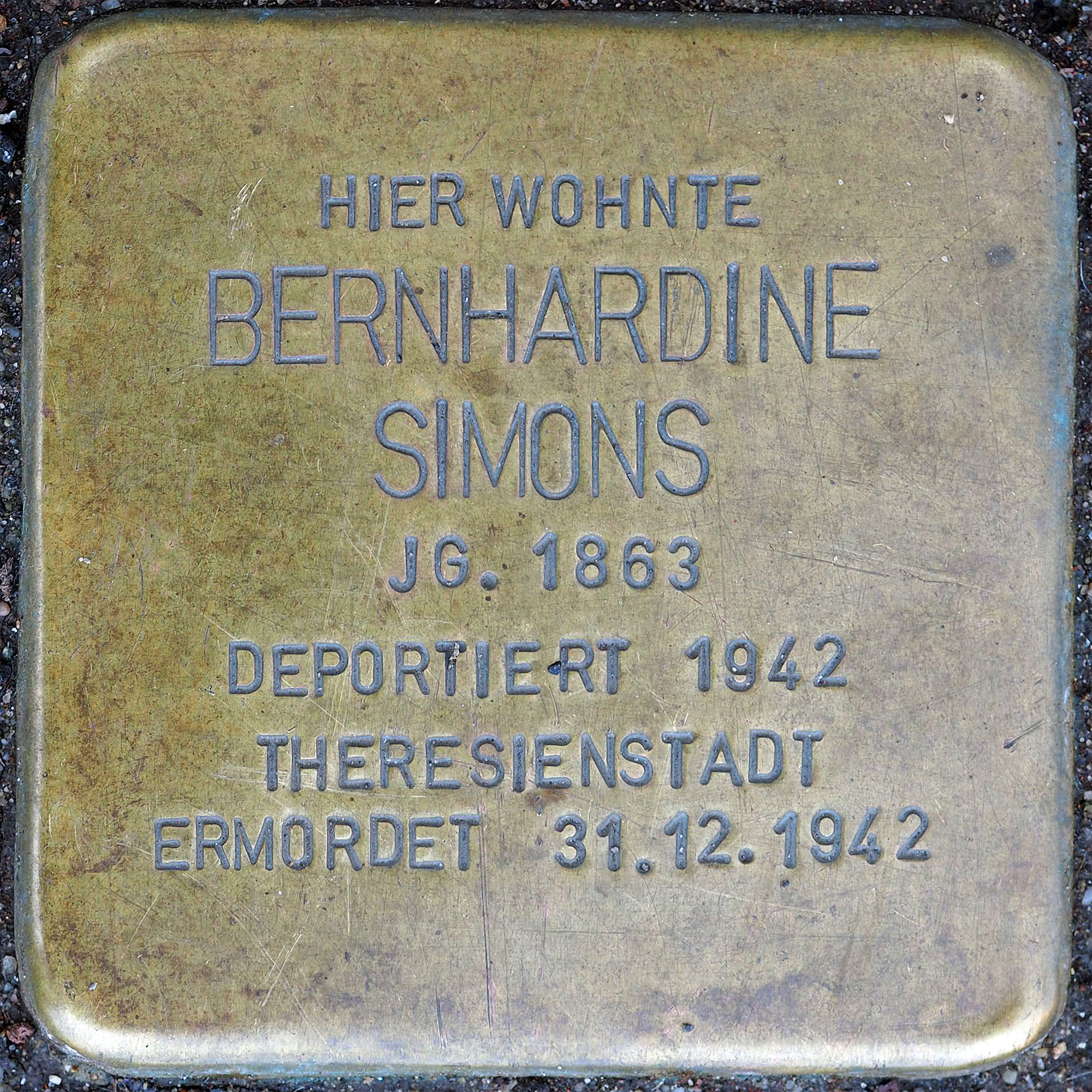 Stolpersteine MG: Simons, Bernhardine